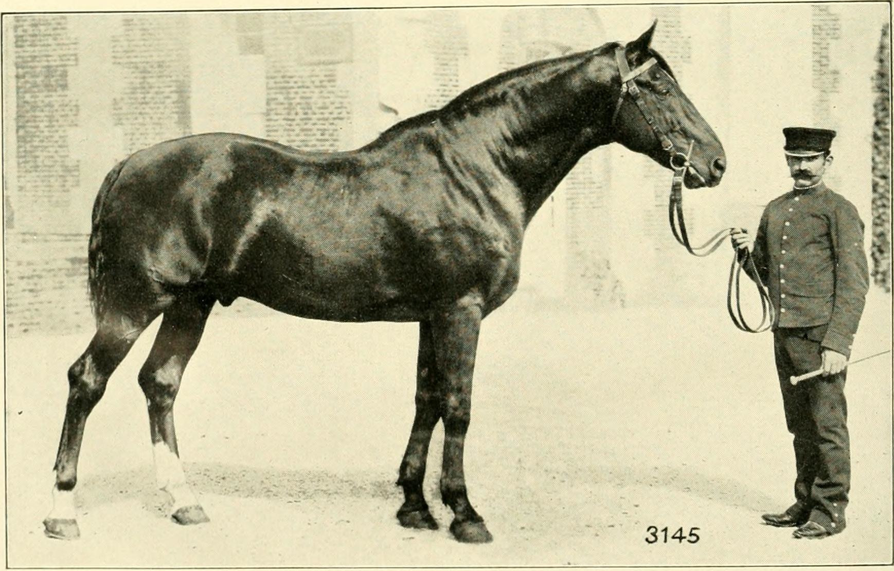 Cherbourg (1880 - ), étalon Anglo-normand, photographié par le studio Delton au Haras national du Pin